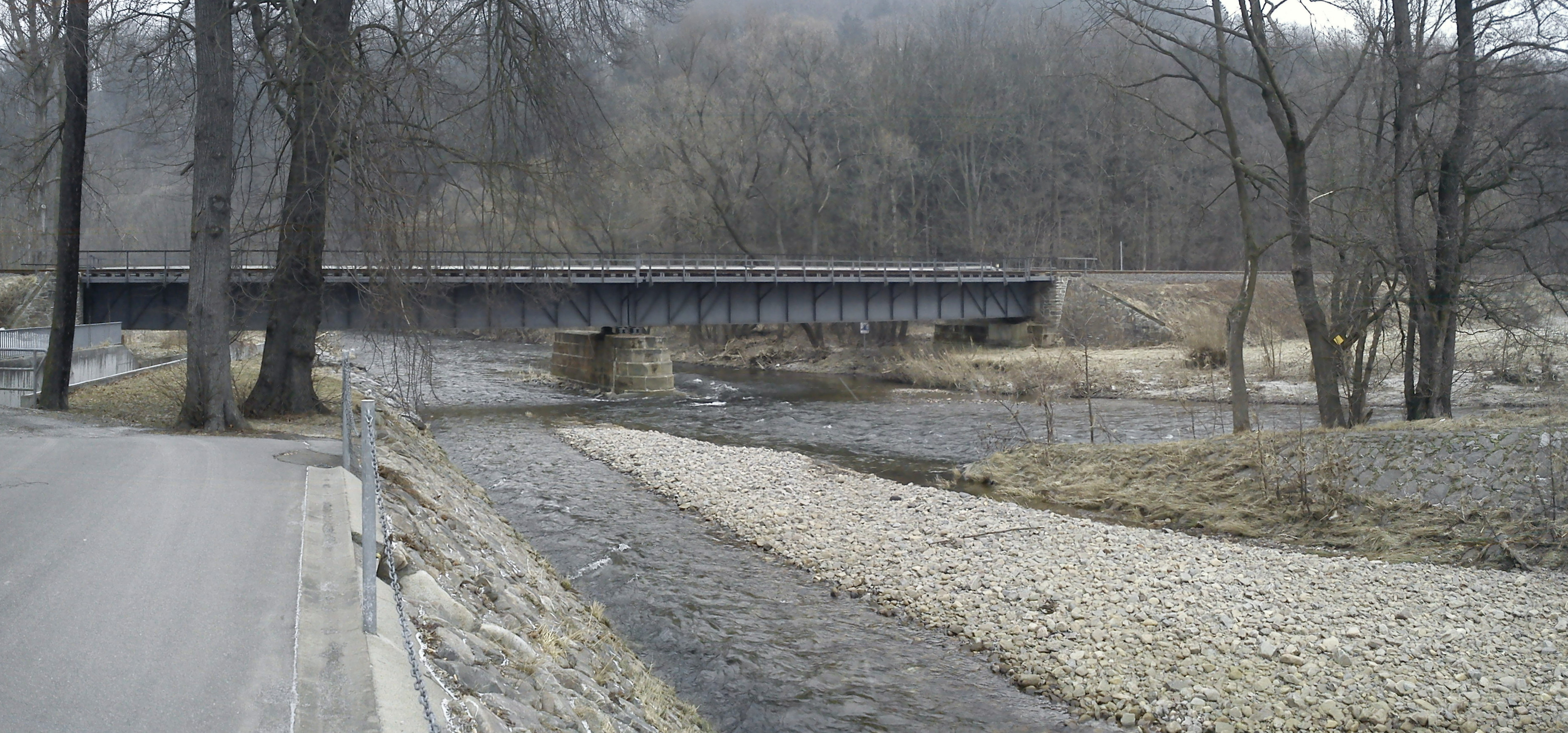 Mündung der Schwarzen Pockau (in Bildmitte) in die Flöha (im Bild rechts) in Pockau - im Hintergrund eine Brücke der Flöhatalbahn.